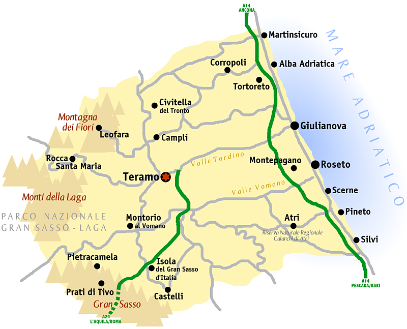 Provincie Teramo